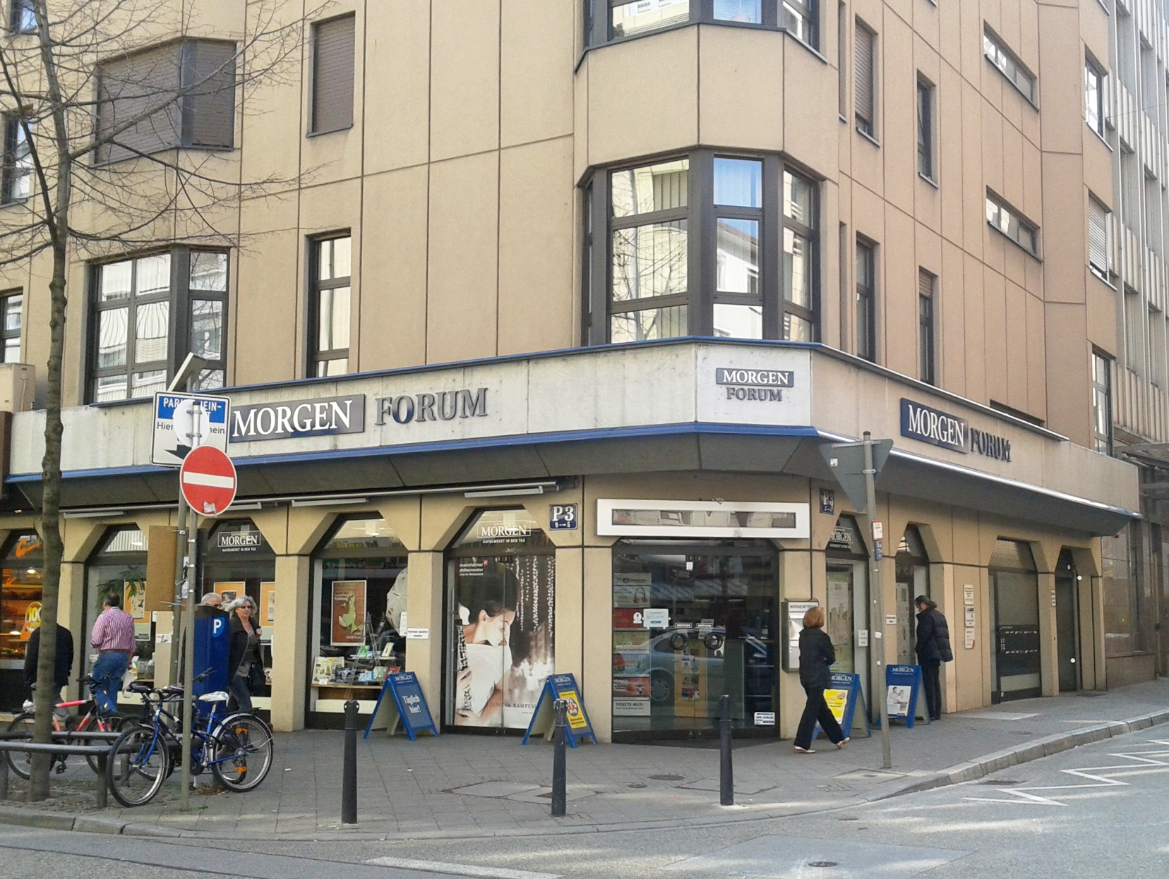 Morgen-Forum des Mannheimer Morgen in Mannheim, P3